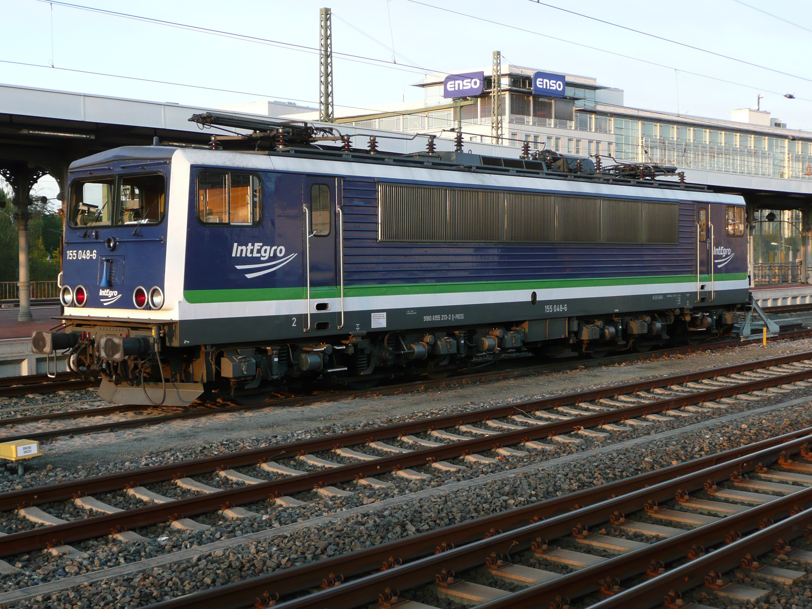 155 213 (jetzt 155 048) der Press abgestellt in Dresden Hauptbahnhof